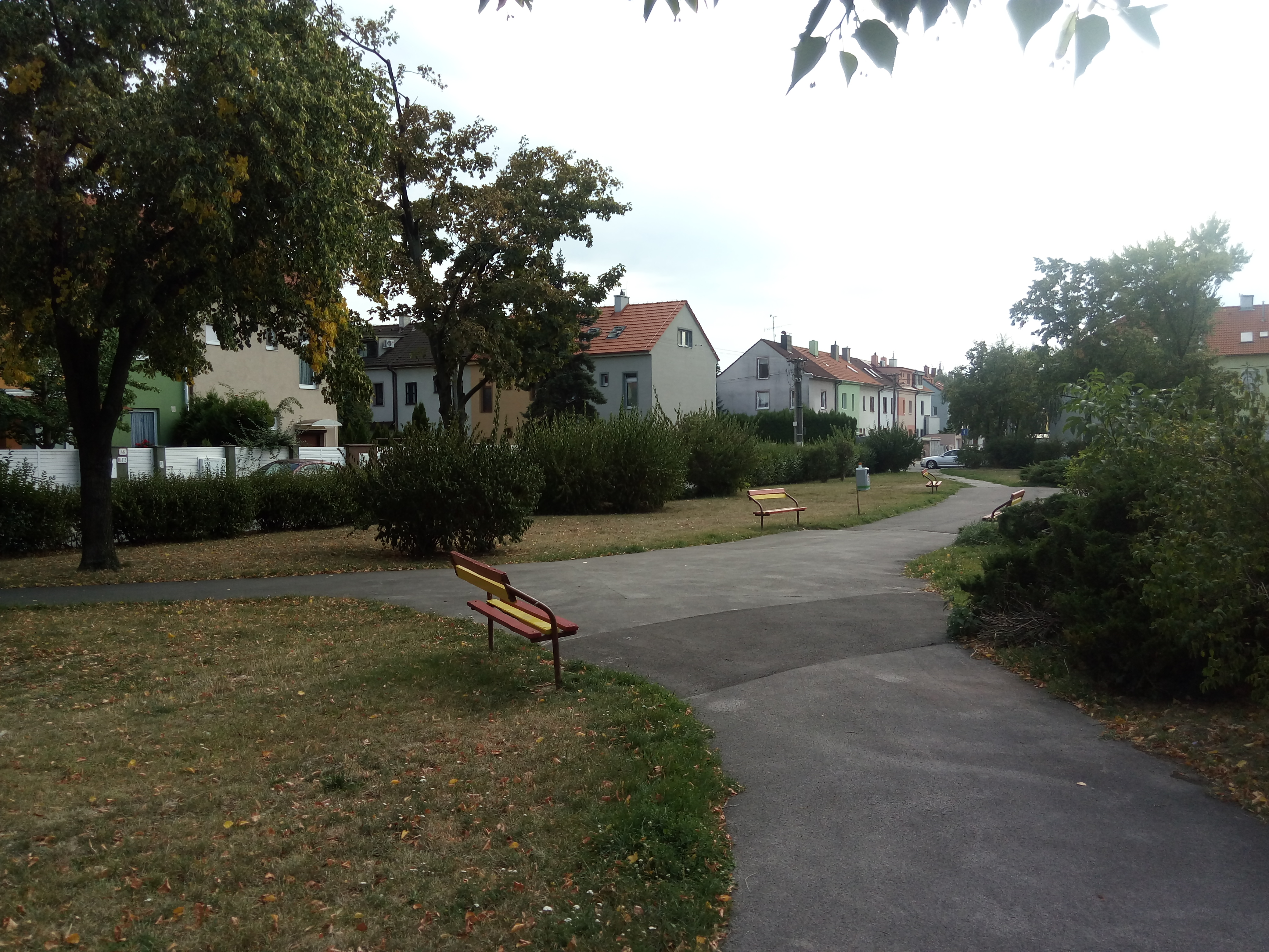 Považská, Nové Mesto, Bratislava